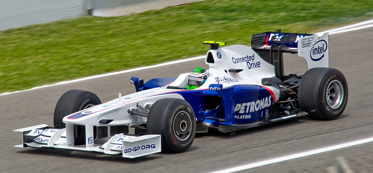 Nikon D90 + Sigma 18-200 DC OS HSM 1/500s - F/13 - 200mm - ISO400